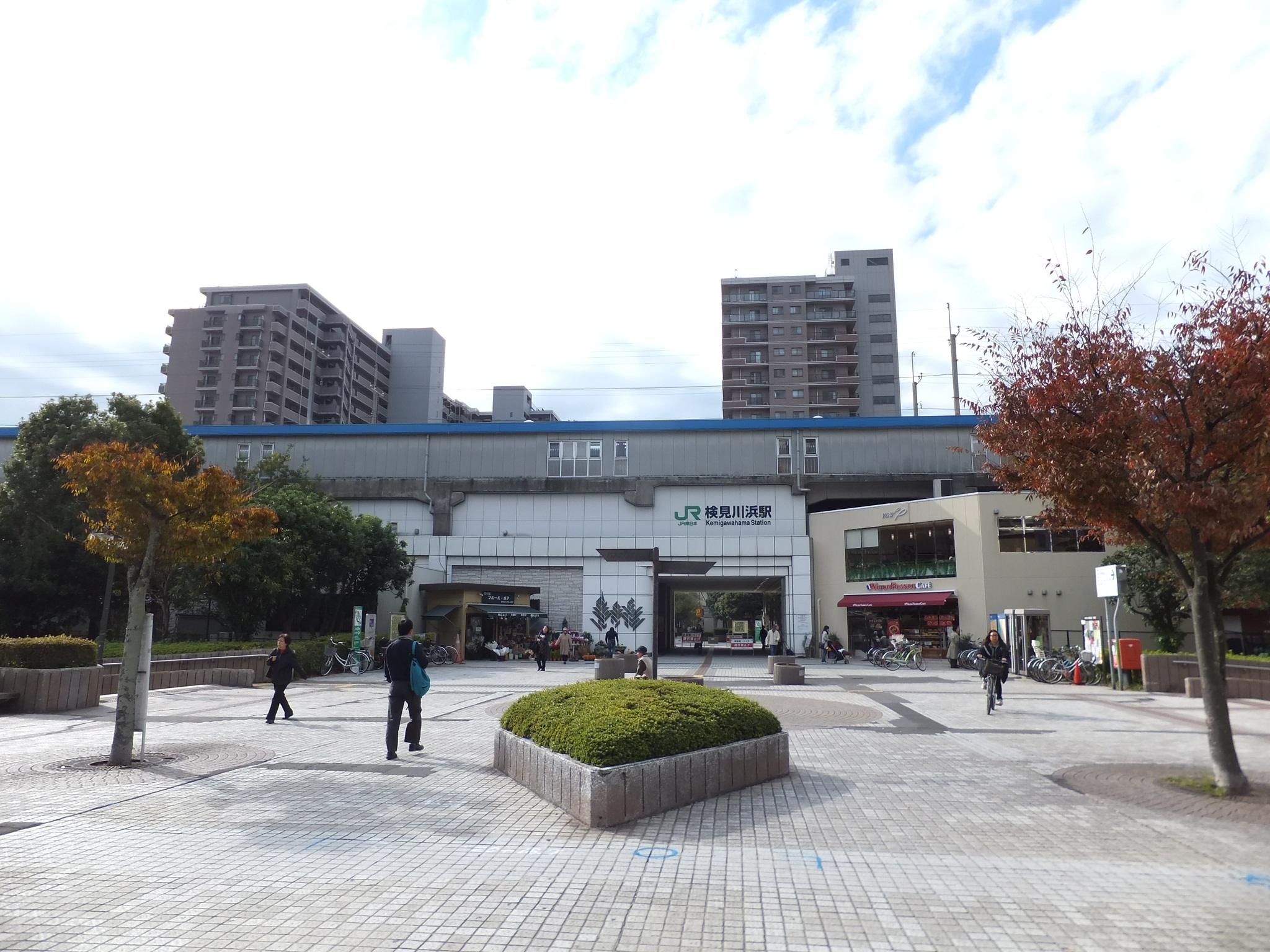 京葉線検見川浜駅北口